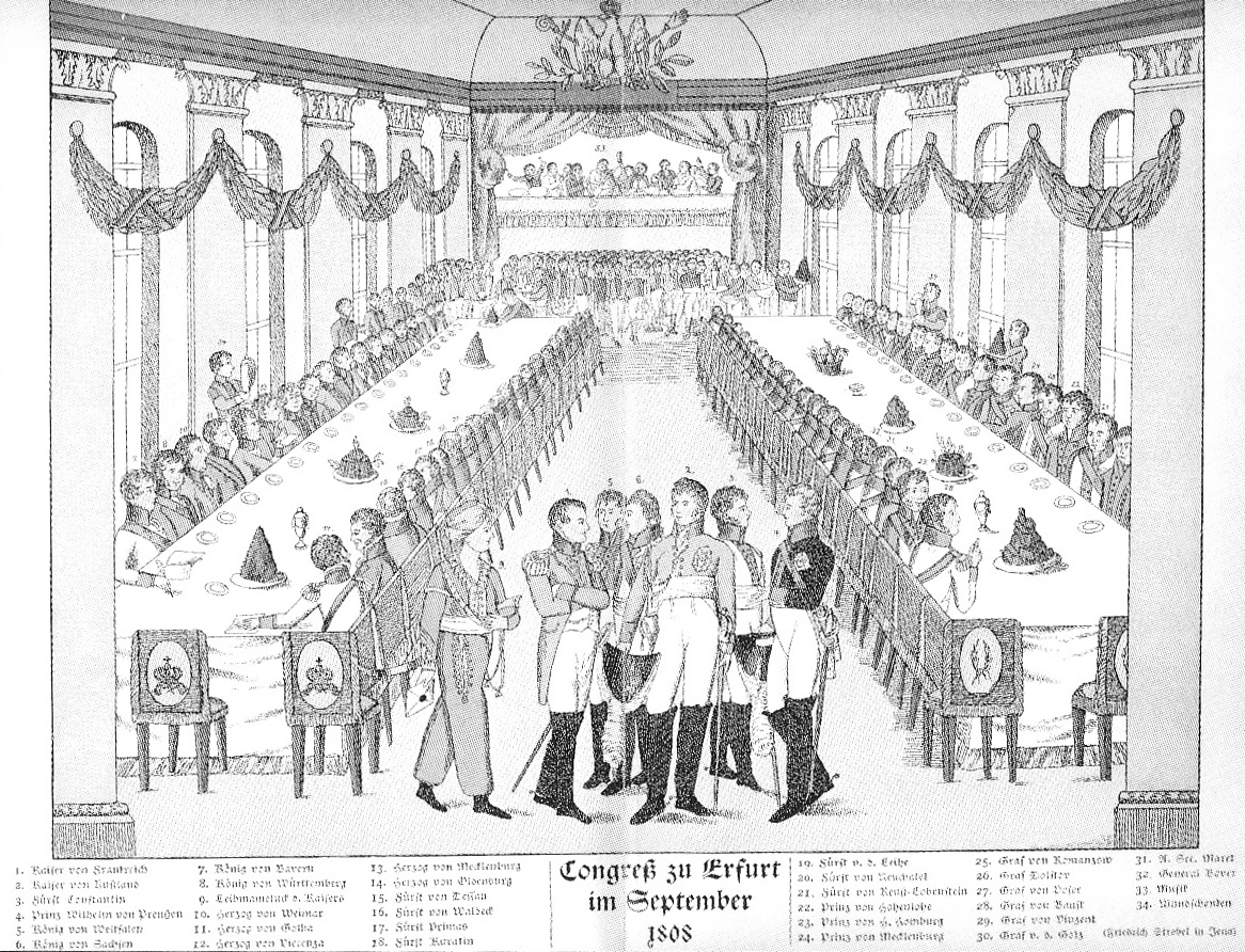 Congreß zu Erfurt im September 1808